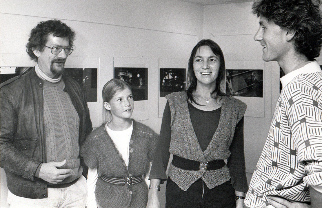 Christian Braad Thomsen och Jytte Rex med dottern Rosemaria pratar film med Leif Molin på Folkets Bio i Malmö 1986.